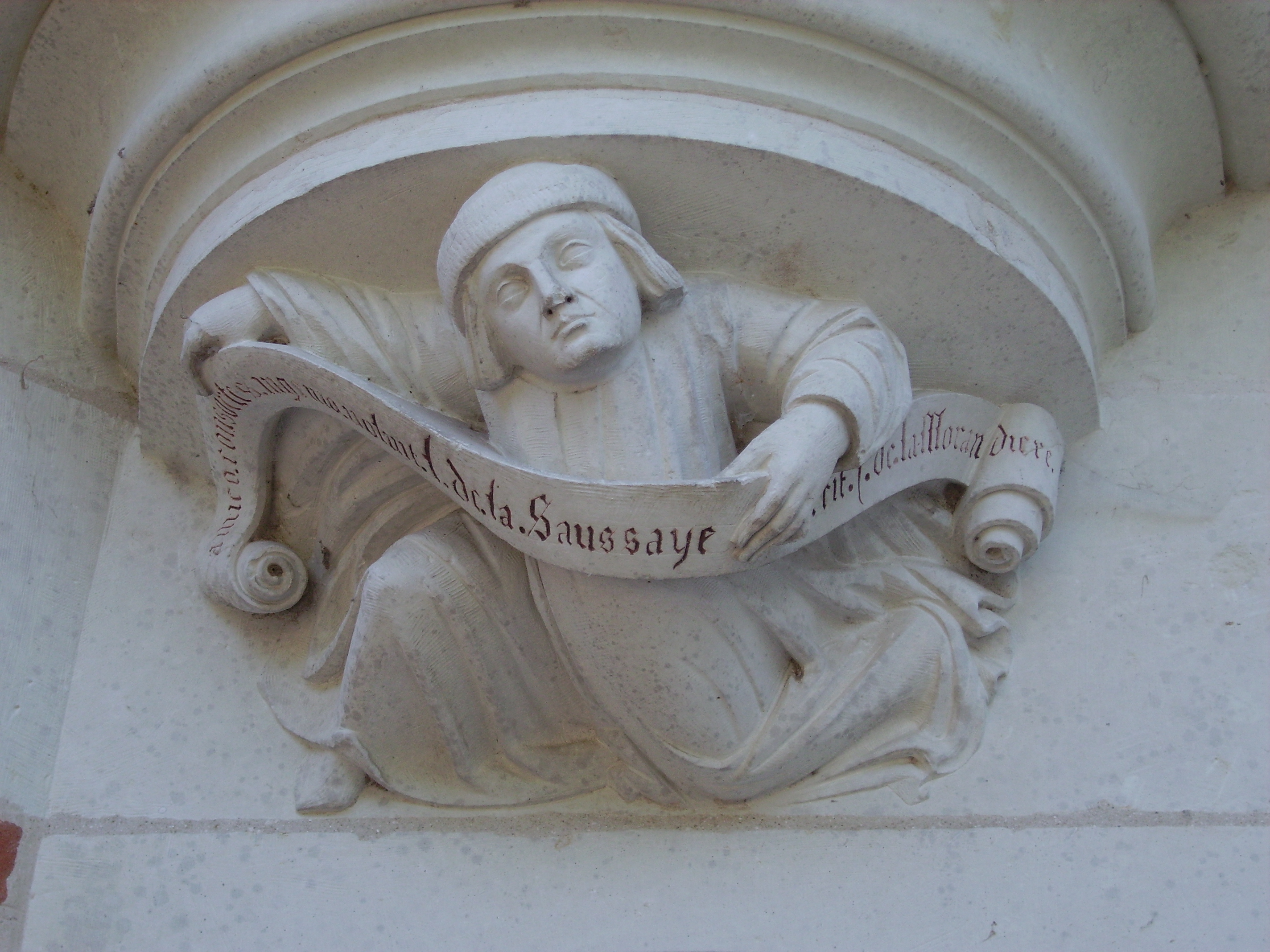 Château of Troussay, France. Boy on Louis 12ve façade. Château de Troussay, France, Loir et Cher. Marmouset de la façade Louis XII.